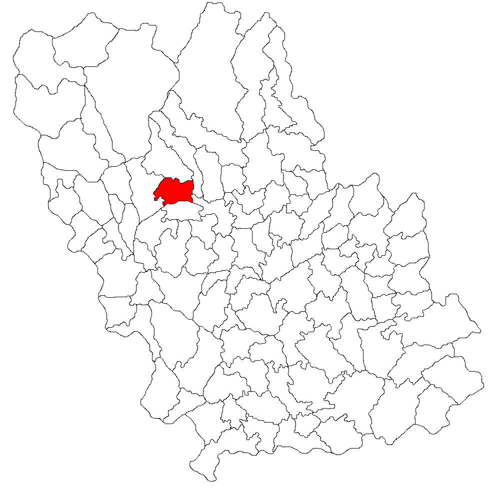 Categorie:Hărţi ale judeţului Prahova